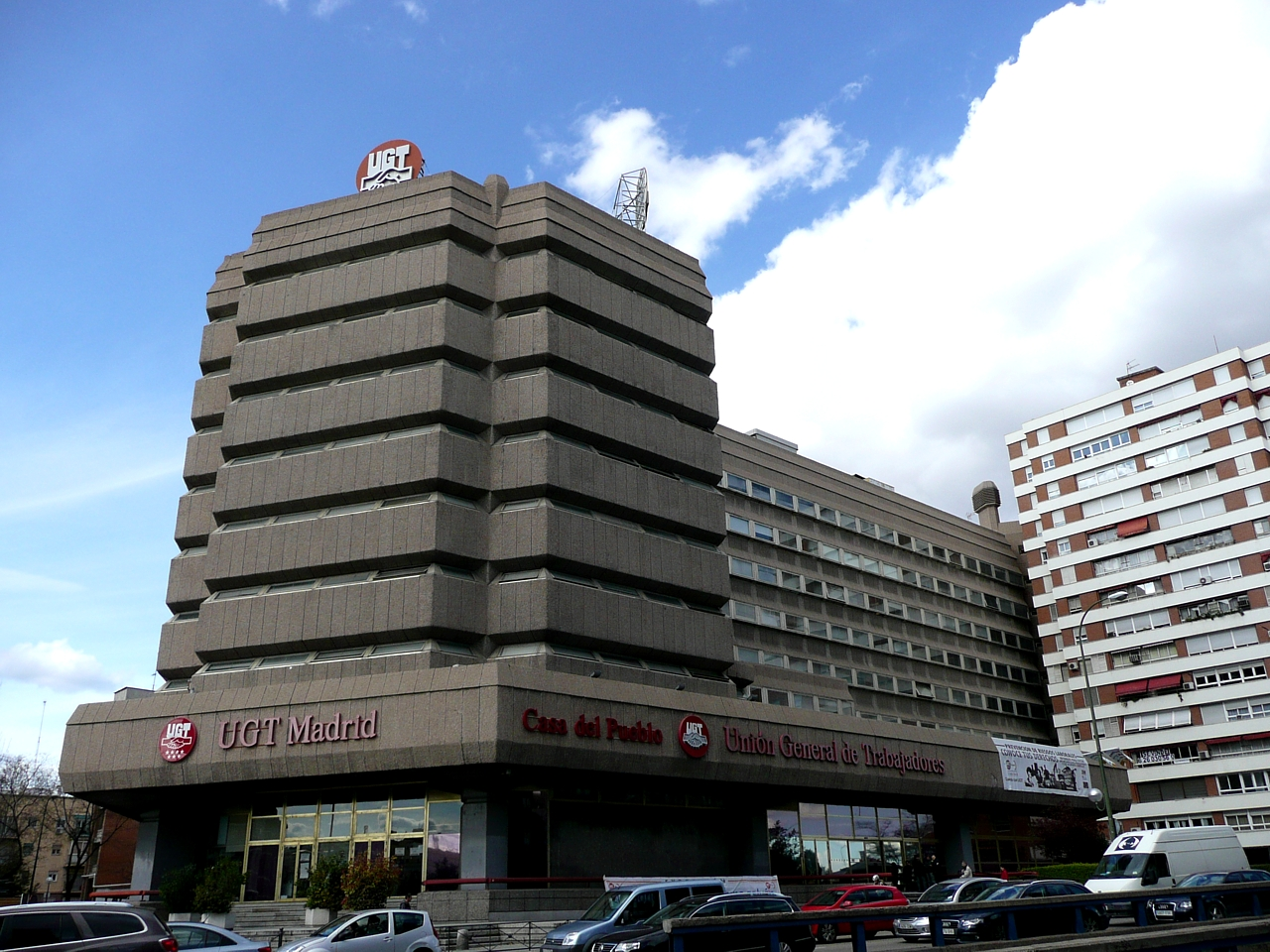 UGT Madrid